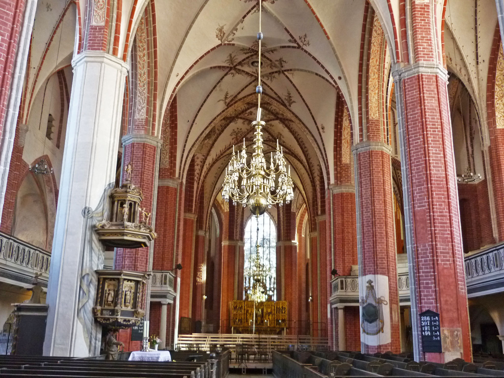 Brandenburg (Havel), St. Katharinenkirche in der Neustadt, Kirchenraum